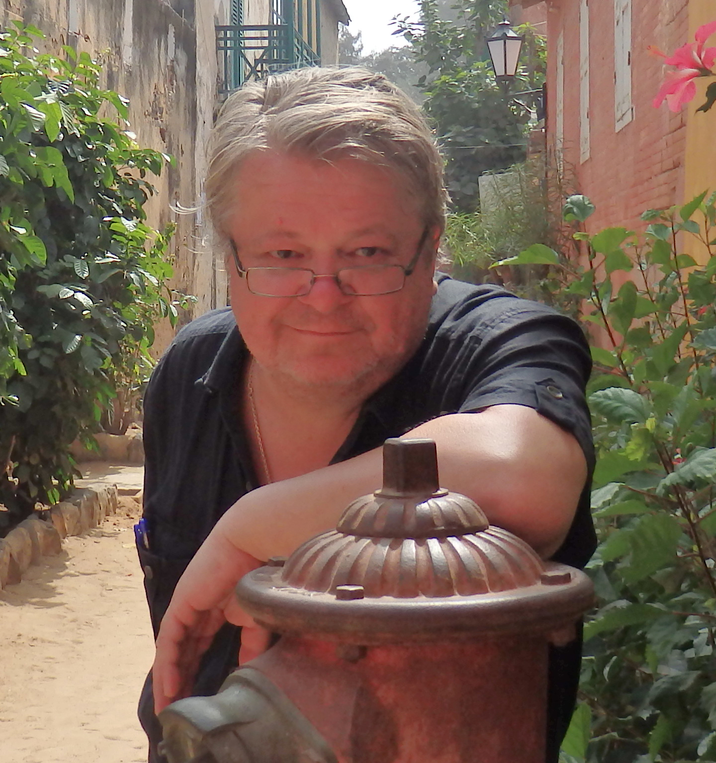 Polityk i publicysta Leszek Bubel prywatnie.